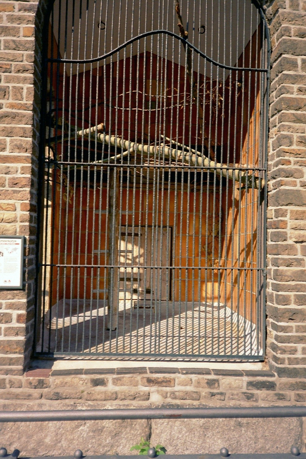 Meerkatzengehege im Zoo Leipzig